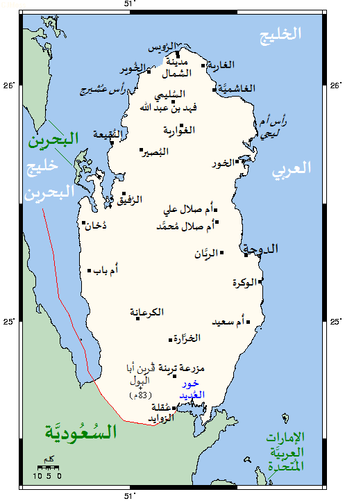 خريطة تُظهر مُدن دولة قطر الرئيسيَّة بِالإضافة لِبلداتها الرئيسيَّة والمناطق المُجاورة.